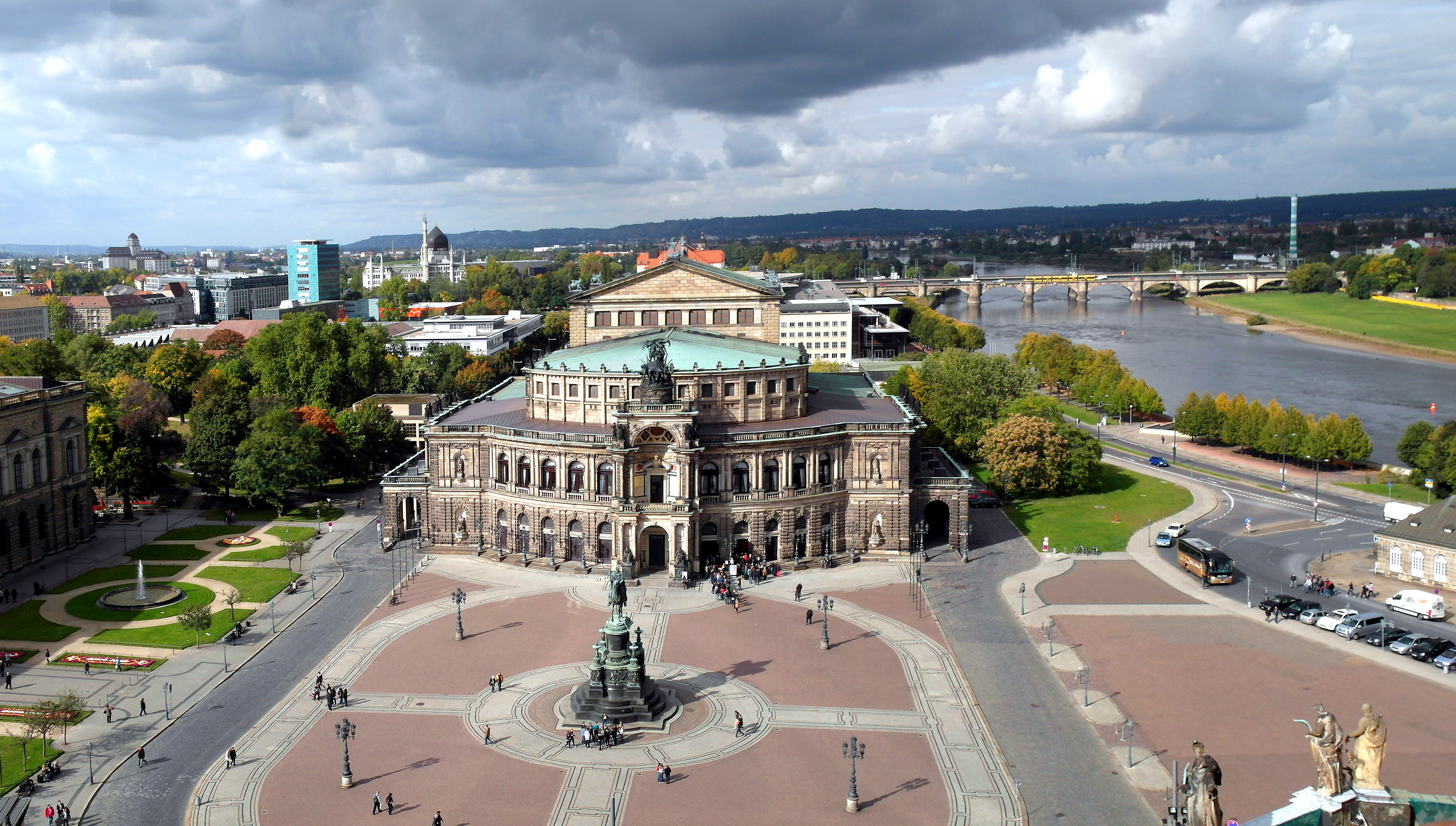 08.10.2012 01067 Dresden-Altstadt, Theaterplatz: Semperoper, erbaut 1871-1878 nach Entwurf von Gottfried Semper im Stile der italienischen Hochrenaissance, ausgeführt von seinem Sohn Manfred Semper. In der Bombennacht vom 13. zum 14.02.1945 ausgebrannt. Wiederaufbau 1977-1985 (GMP: 51.054445,13.735211). Vorn das Reiterstandbild König Johann von Sachsen (1889 von Johannes Schilling). [DSCN1721+1726.JPG]20121008620MDR.JPG(c)Blobelt